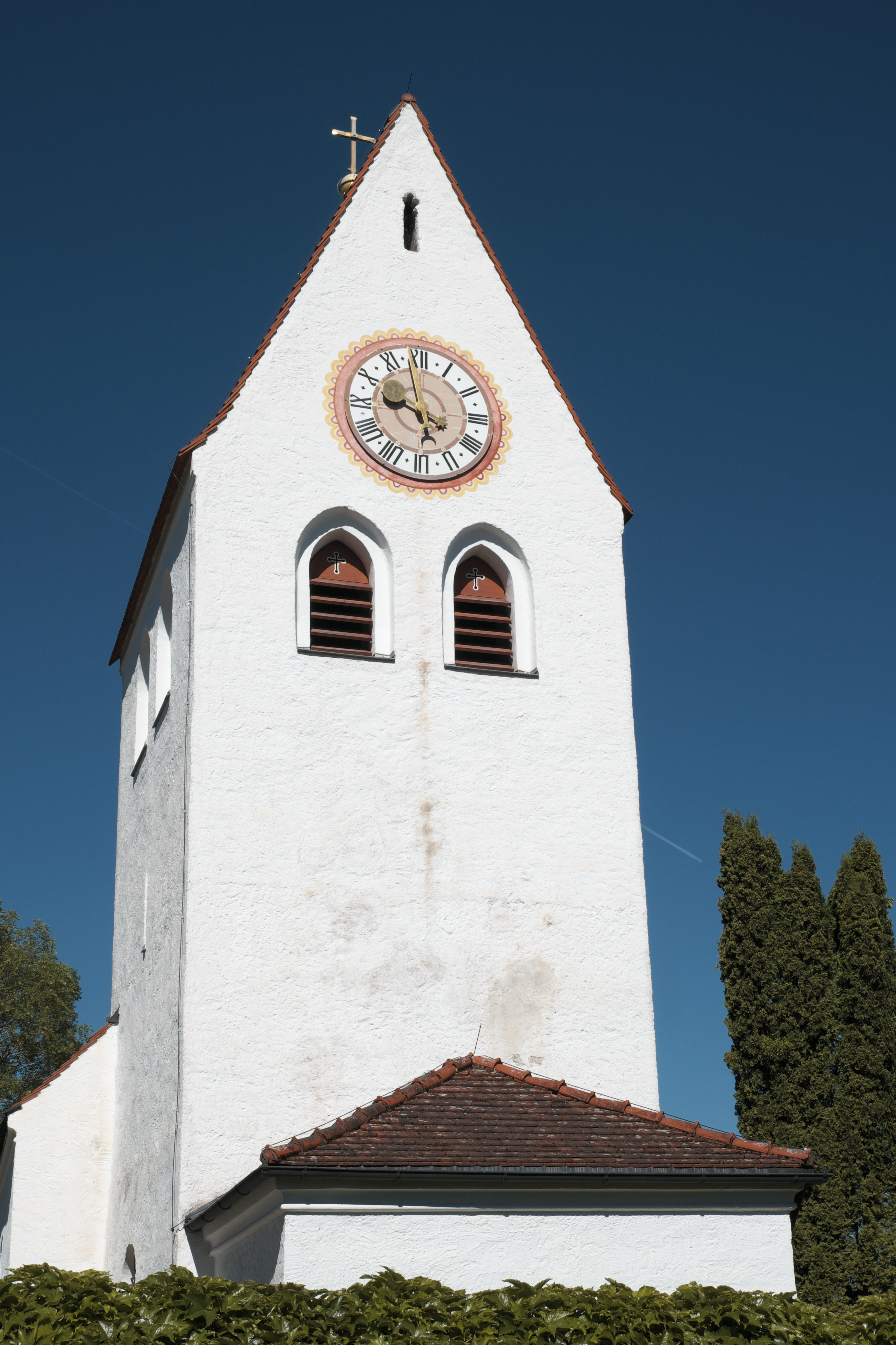 Katholische Filialkirche St. Michael in Hanfeld (Starnberg) (Bayern, Deutschland)